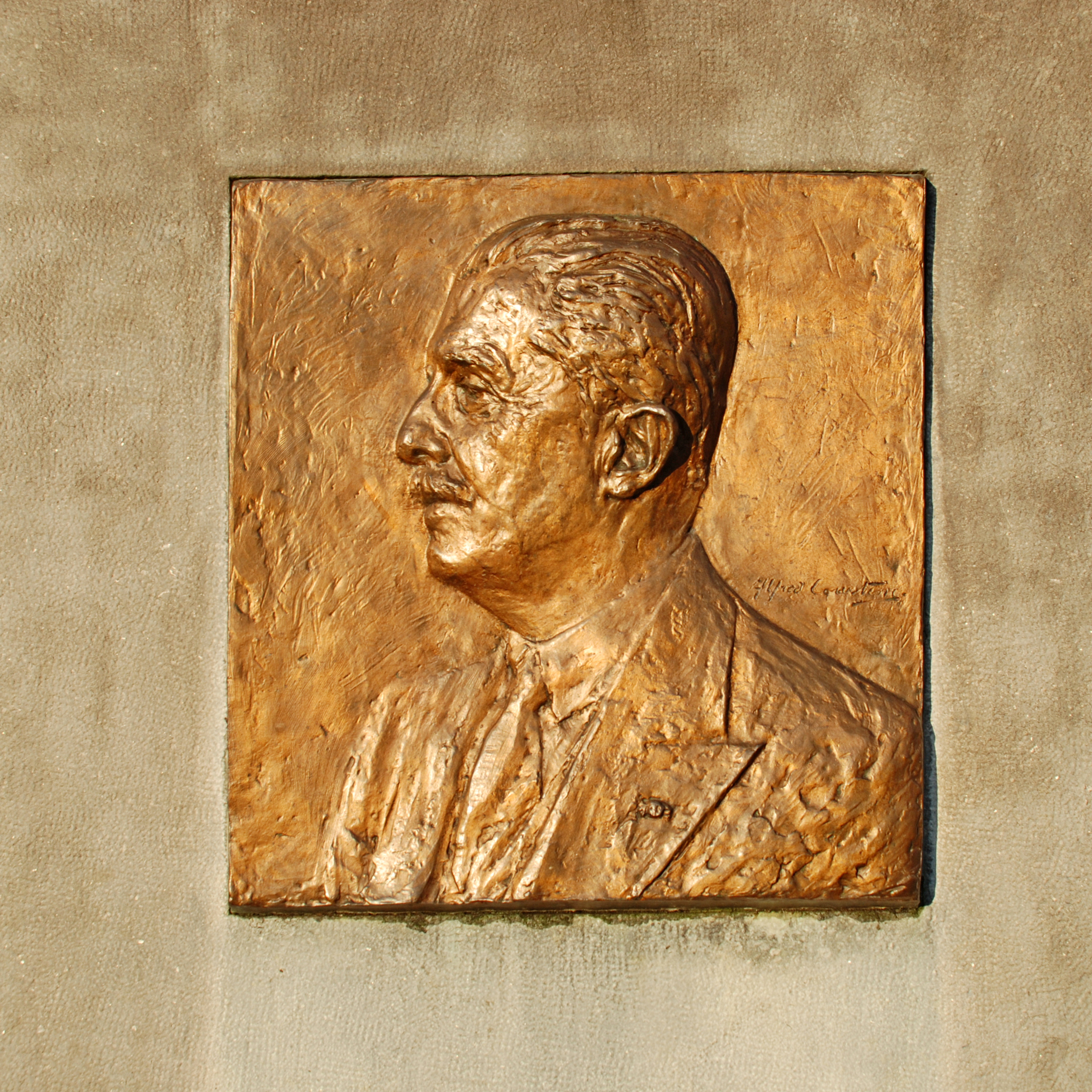 Belgique - Brabant wallon - Court-Saint-Étienne - Grands bureaux de l'usine Henricot n°2 - Stèle Paul Henricot (Courtens)